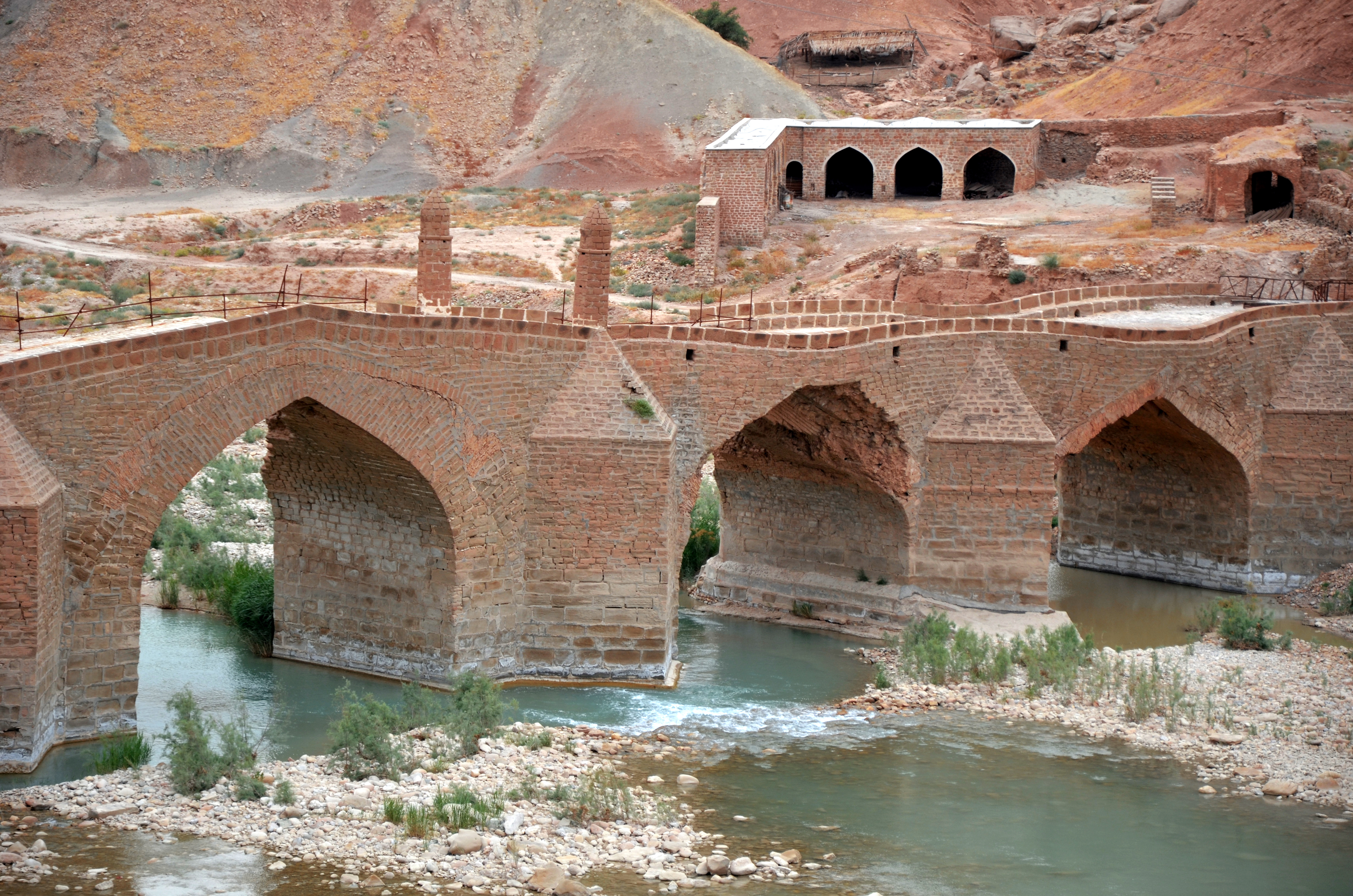 Dalaki - Moshir bridge